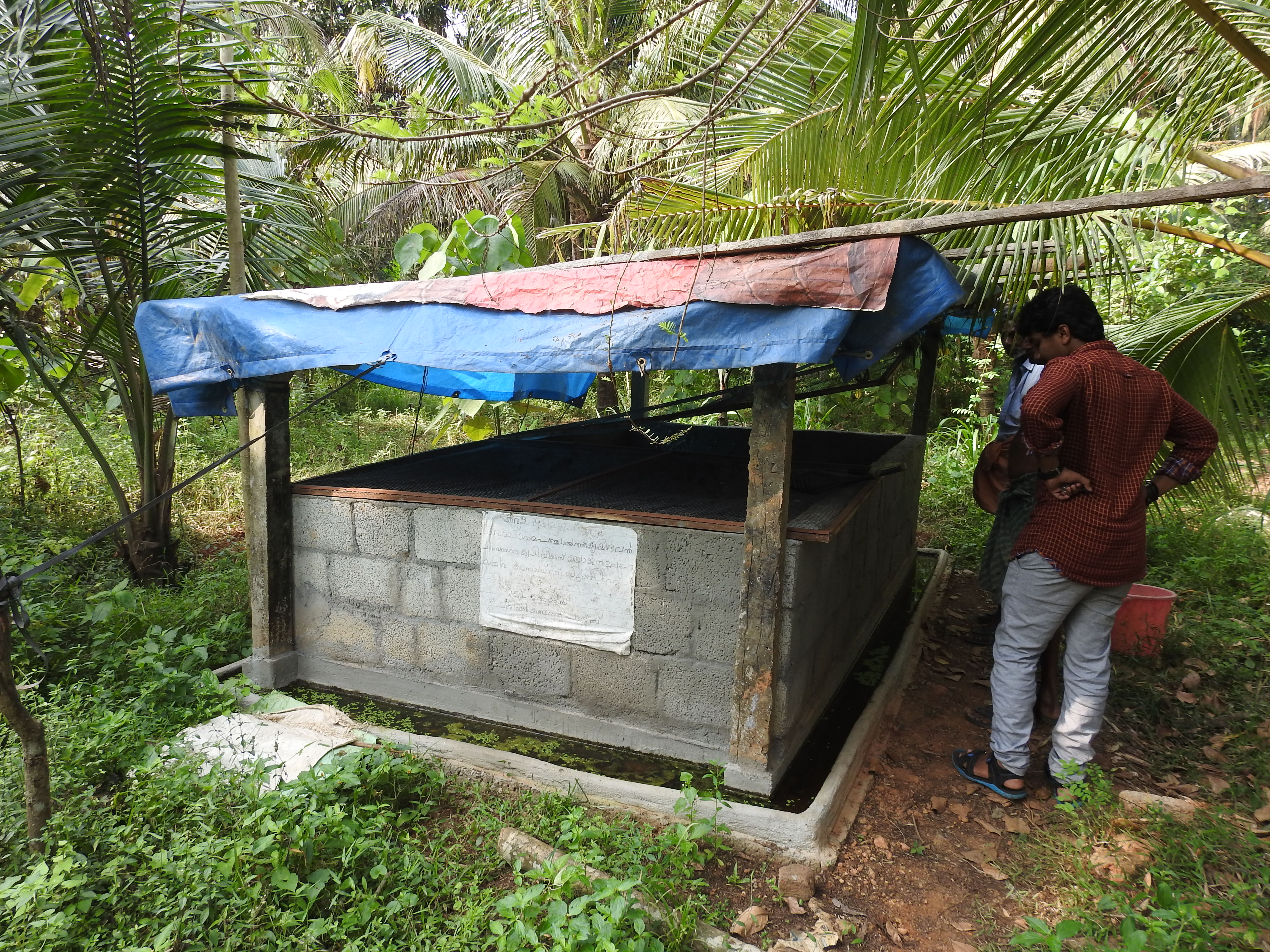 മണ്ണിരക്കമ്പോസ്റ്റ് പ്ലാന്റ്